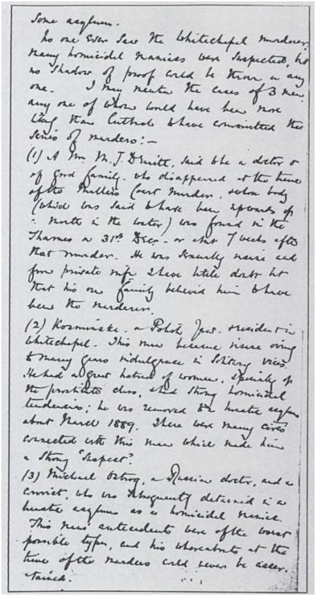 socalled Macnaghten memorandum from Melville Macnagthen (1853-1921). Suspects a man called "Kosminski" to be Jack the Ripper